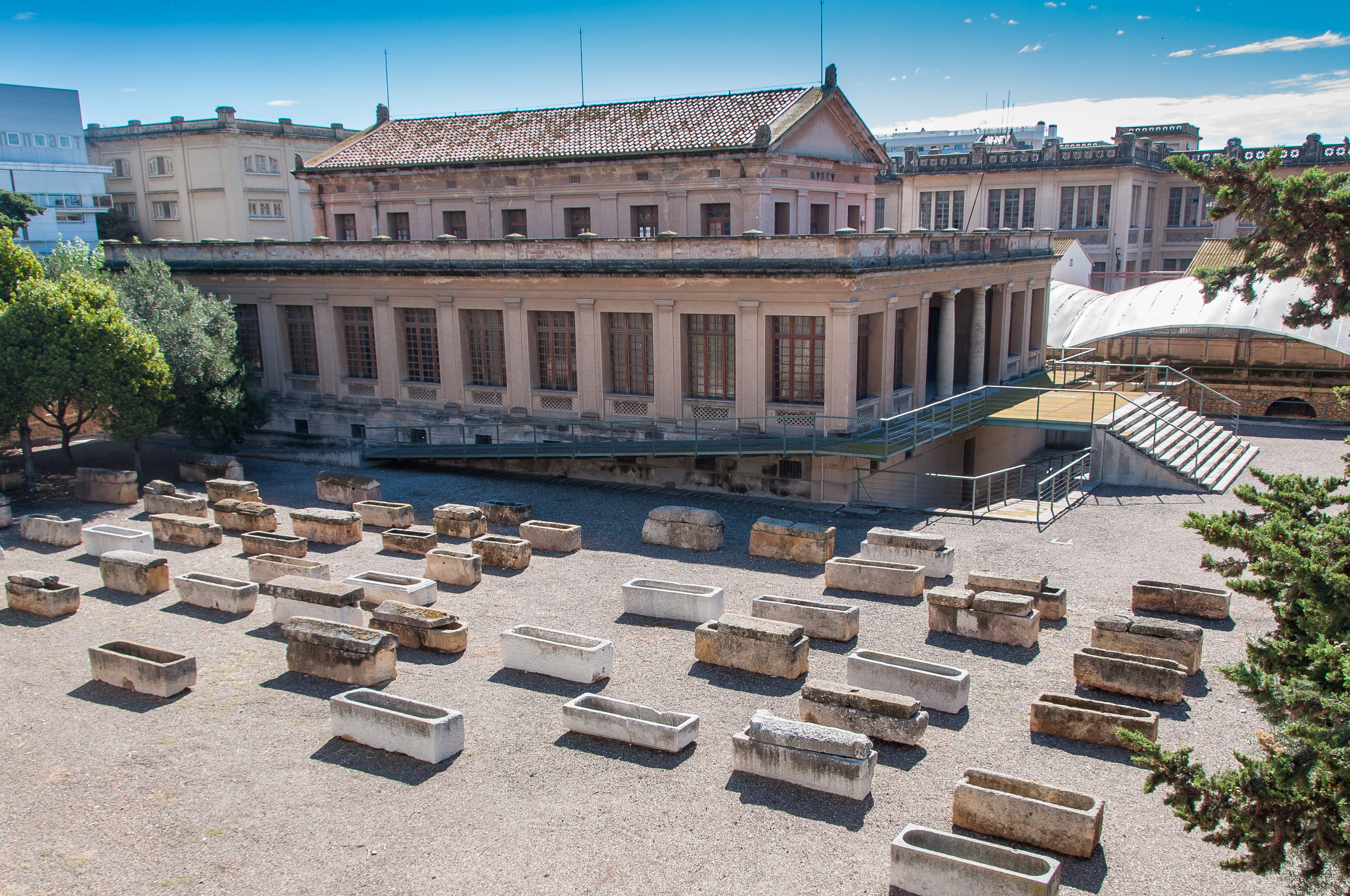 La necrópolis paleocristiana de Tarragona es un conjunto funerario de la época tardoromana de mediados del siglo III dC. Fue descubierta el año 1923 durante los trabajos de construcción de la fábrica de Tabacalera que está actualmente a su lado. Forma parte del Conjunto arqueológico de Tárraco, declarado Patrimonio de la Humanidad por la UNESCO. El área de cementerio cuenta con unas 2.051 tumbas que abarcan desde el siglo III hasta el periodo visigótico. Es el área funeraria tardoromana al aire libre más importante del Occidente romano. El recinto está formado por una zona excavada al aire libre (protegida por una estructura metálica), el edificio del museo, unas criptas funerarias y una zona de jardines con sarcófagos expuestos al público.